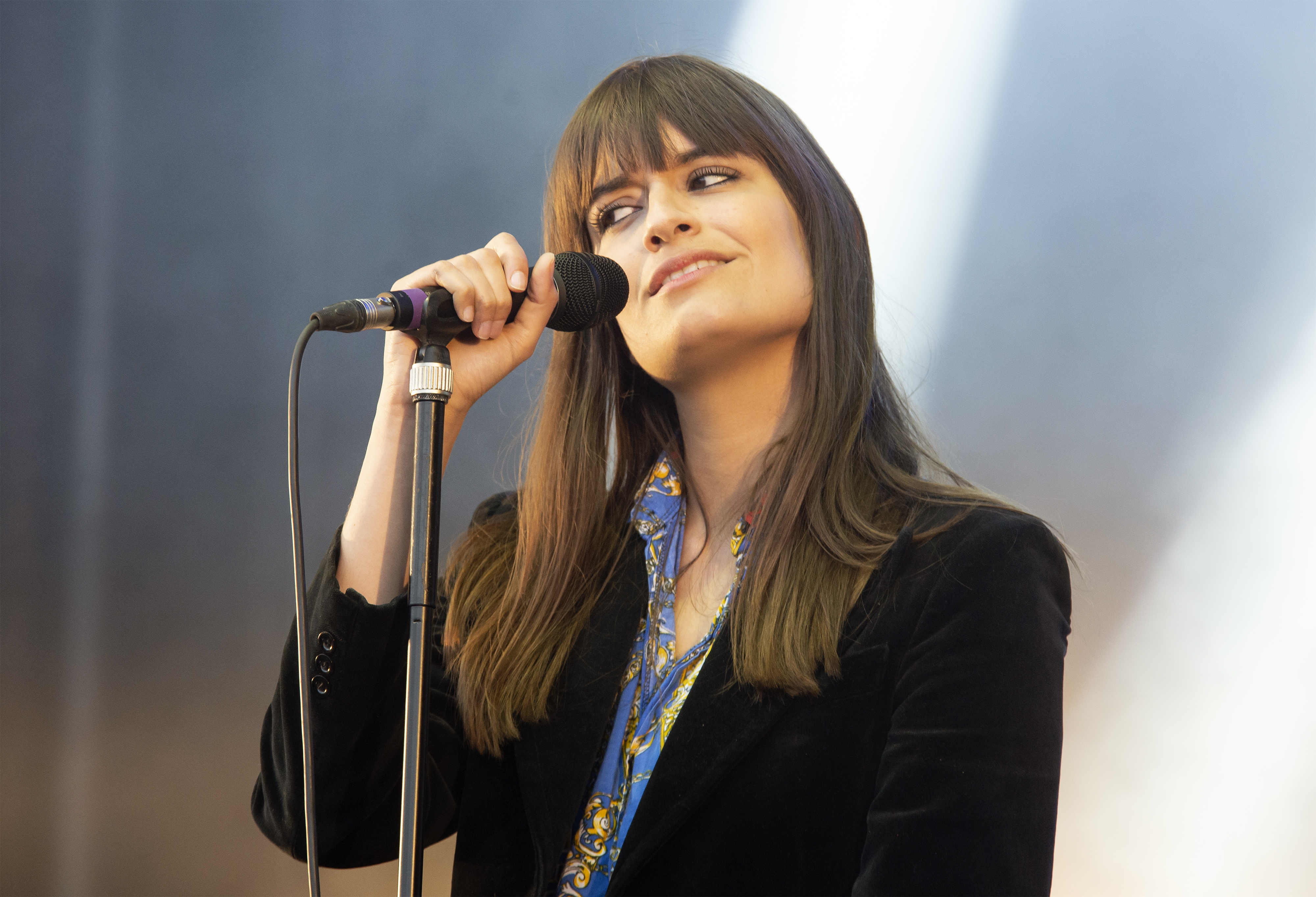 Concert de Clara Luciani au festival Papillons de nuit 2019 à Saint-Laurent de Cuves, Manche, Normandie.